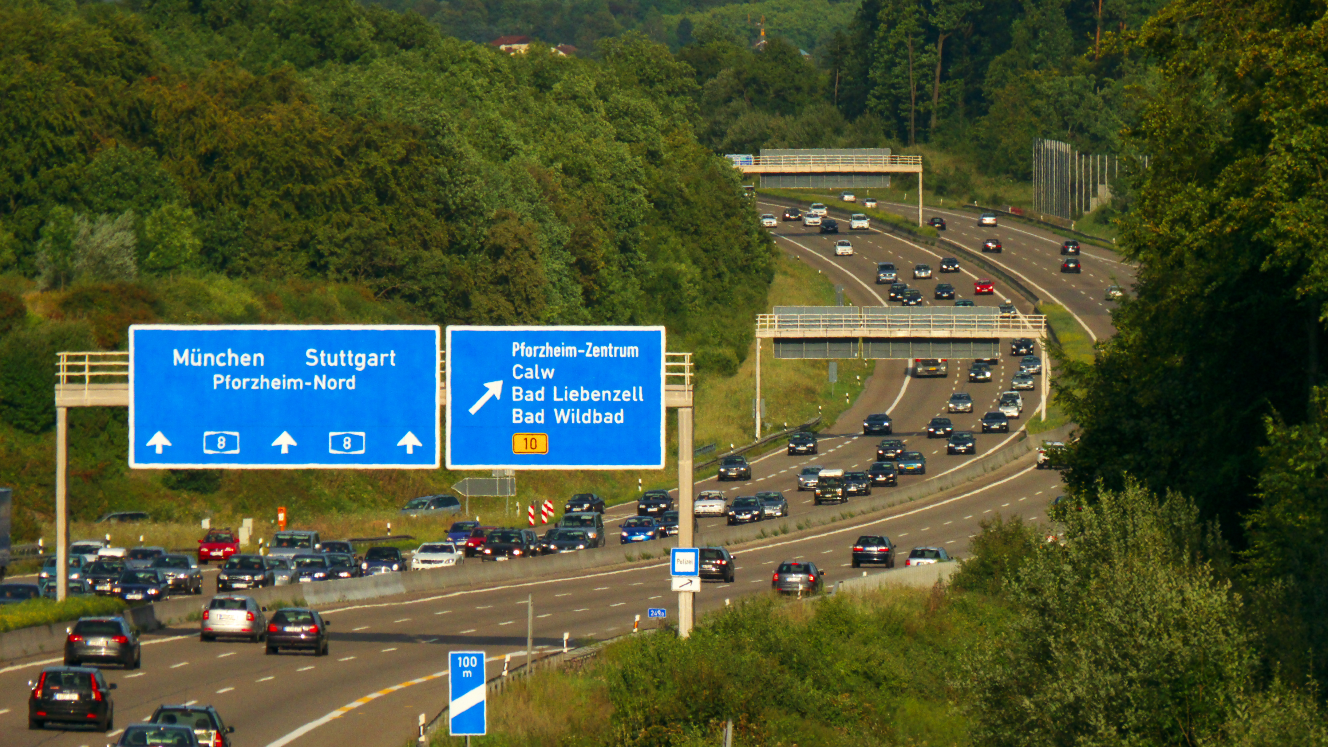 A8 to Munich Anschlussstelle Pforzheim-West